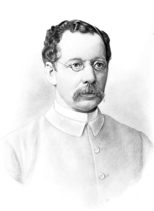 Lüderitz, Adolf